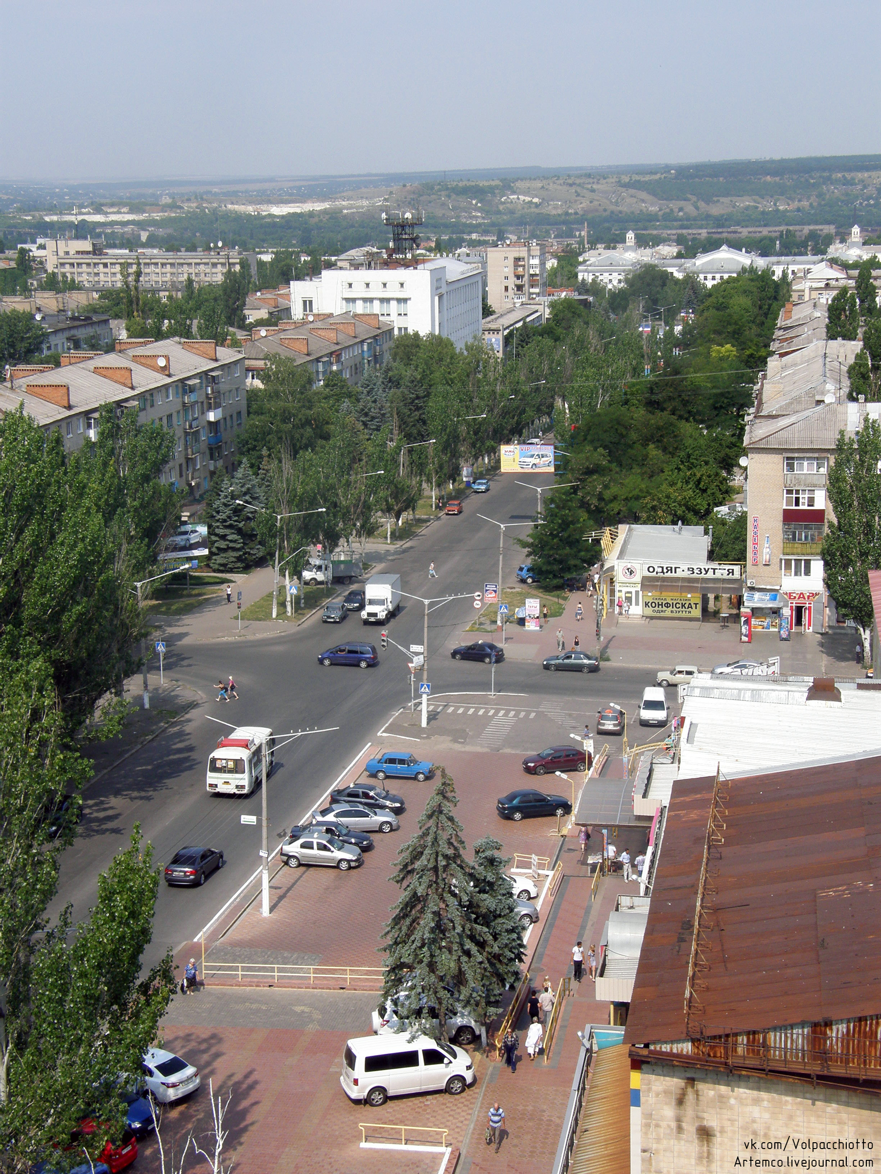 ул. Дворцовая вниз от перекрёстка с ул. XIX Партсъезда